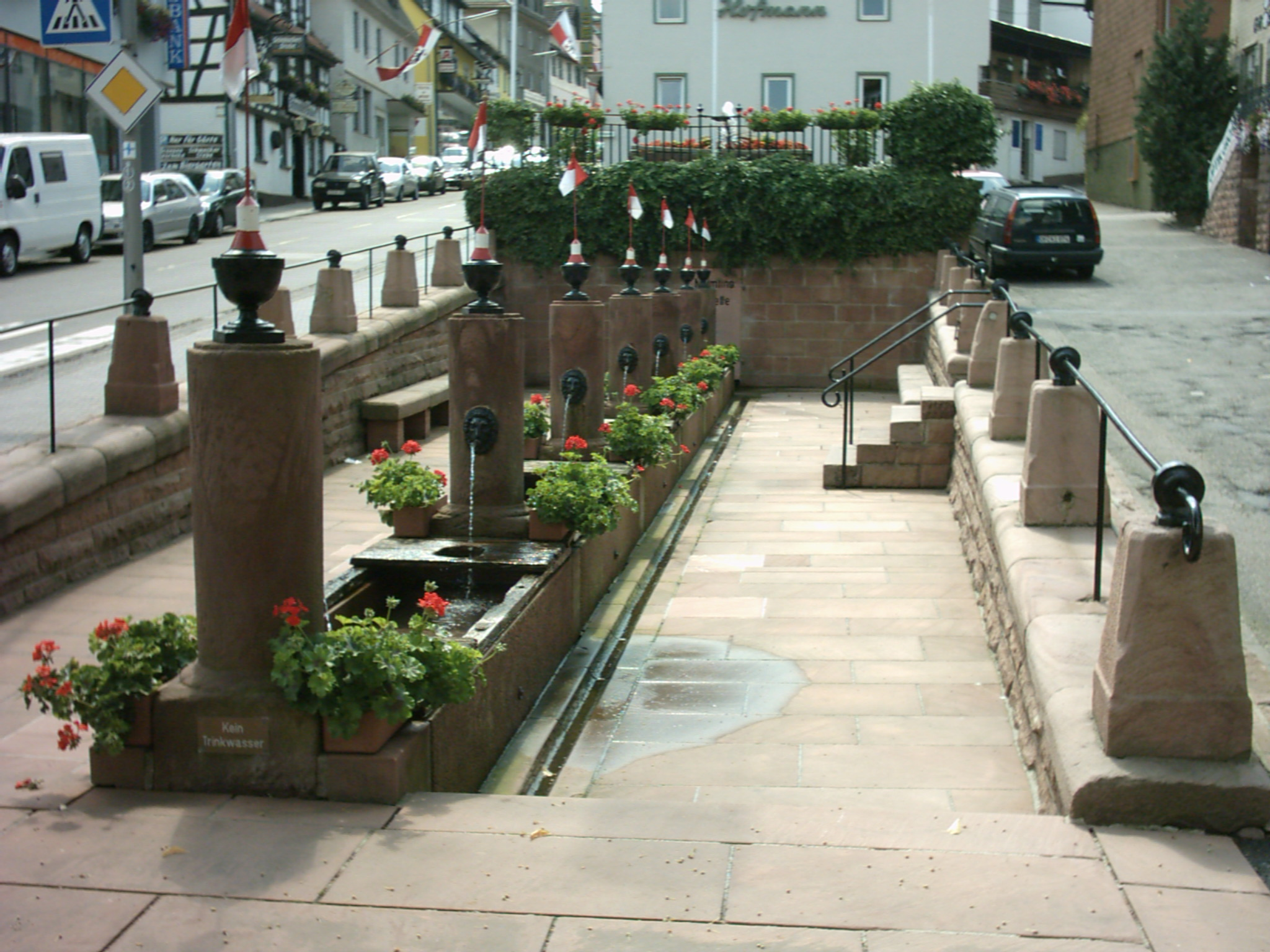 Beschreibung: Mümlingquelle (Zwölf-Röhren-Brunnen) von 1810 in Beerfelden Fotograf: presse03, selbst fotografiert 2005 Lizenz: GNU-FDL